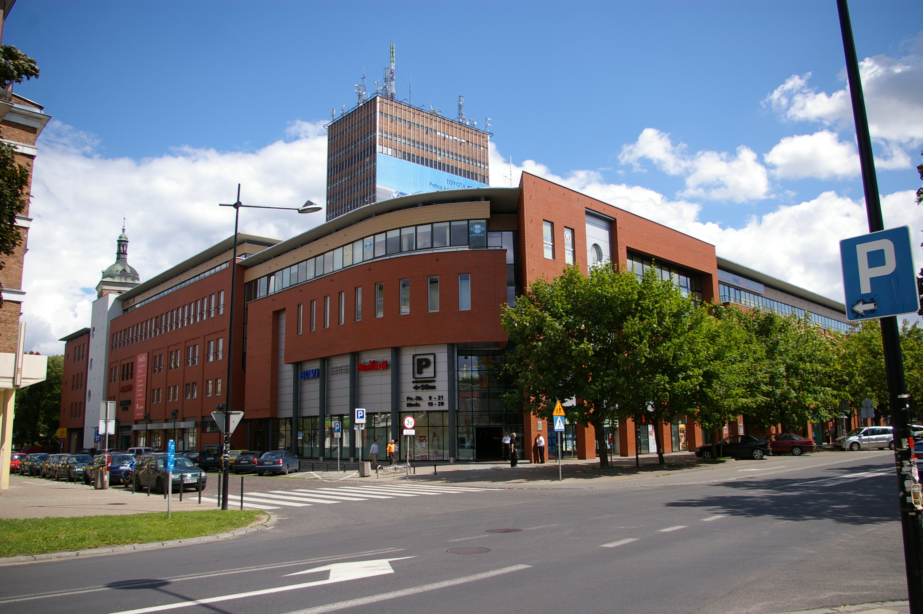 Centrum Handlowe "Madison". Skrzyżowanie ulic Jana Hewelisza i Gnilnej.